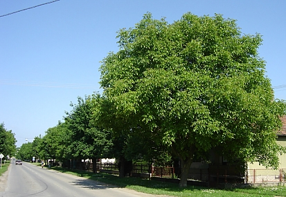 en: Betonska ulica (street), Beli Manastir (Hrvatska) sh: sh: Betonska ulica, Beli Manastir, Hrvatska